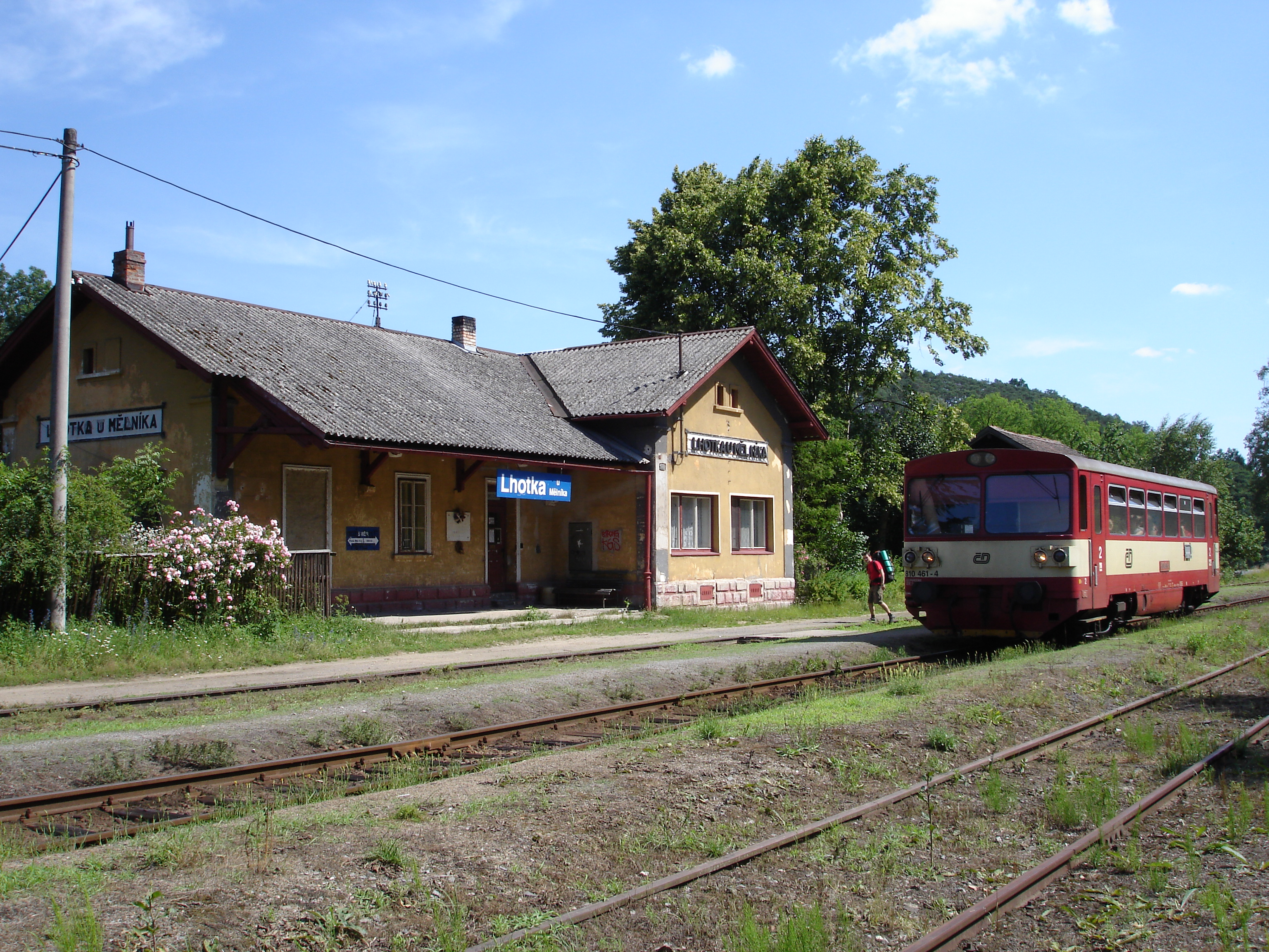 Motorovy vuz rada 810 v stanici Lhotka u Mělníka